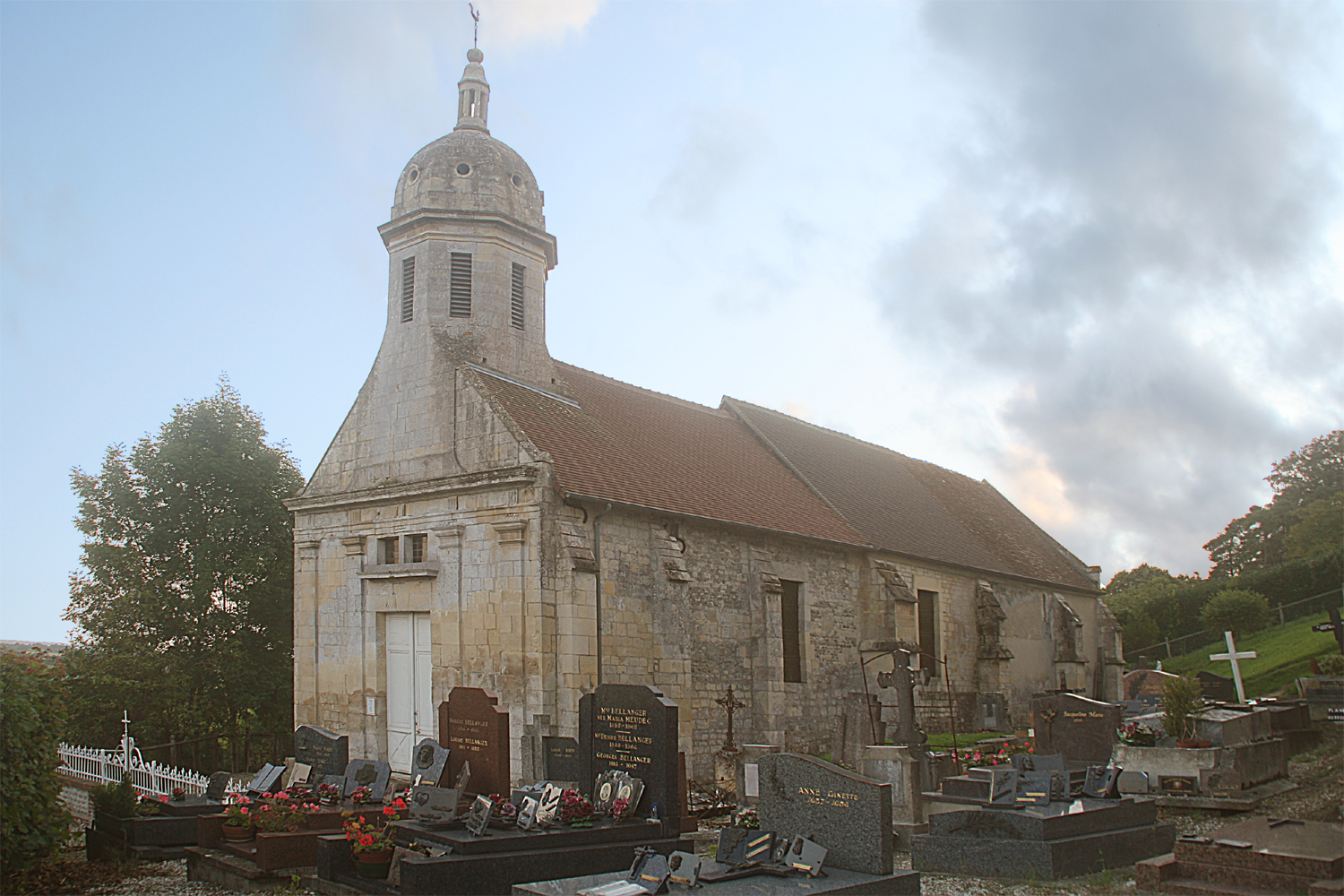 l'église pariossiale